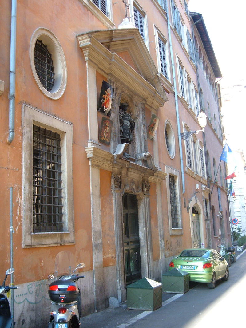 Chiesa di San Giuliano Ospitaliere dei Fiamminghi, nel rione Sant'Eustachio, a Roma. Foto personale.